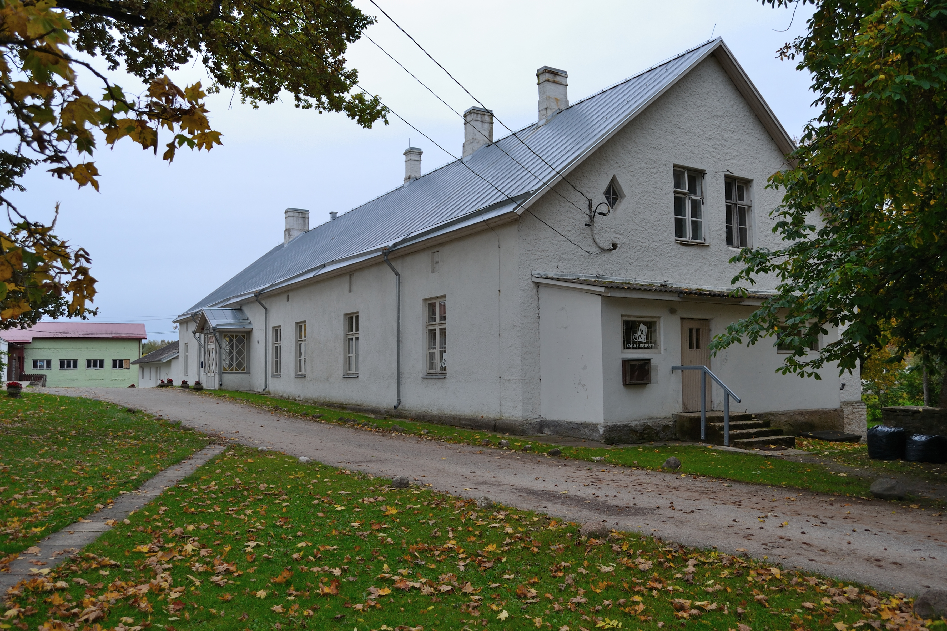 Rapla pastoraadi peahoone